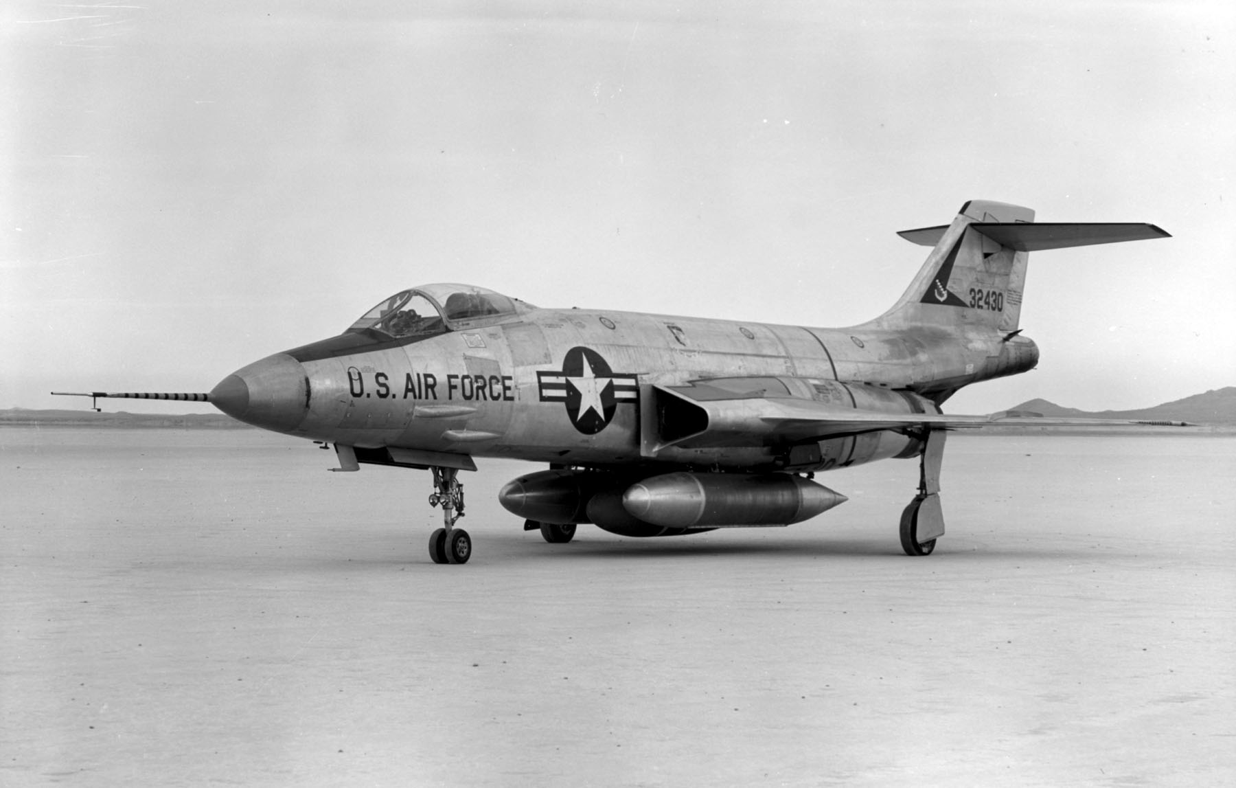 McDonnell F-101A Voodoo.